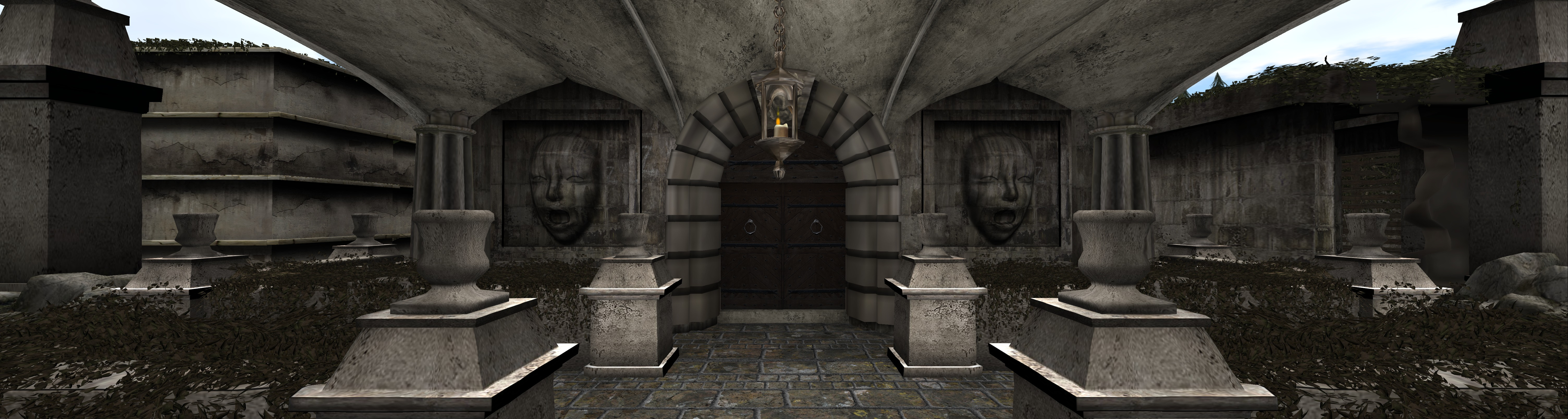 Landschaft in Second Life (Screenshot)